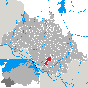 Grebs-Niendorf in Mecklenburg-Vorpommern - district Ludwigslust